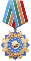 Oʻzbekcha/ўзбекча: Doʻstlik ordeni